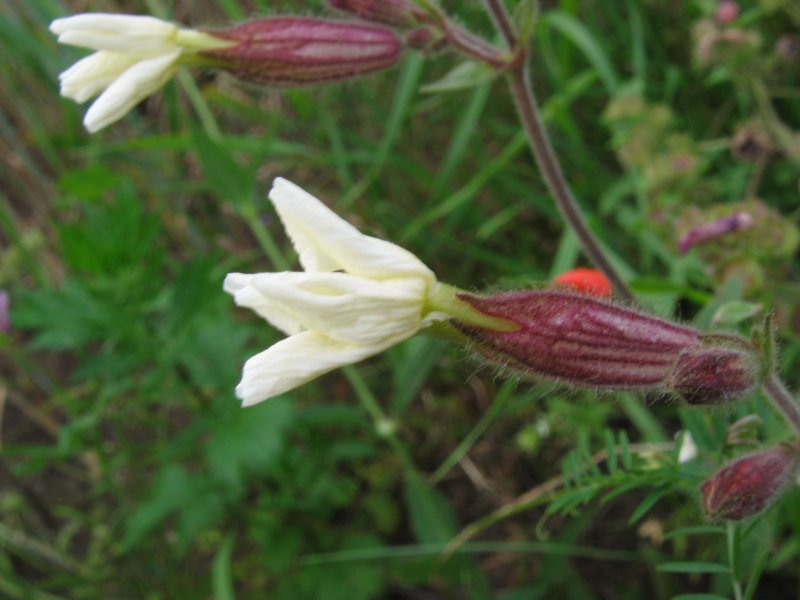 Silene latifolia, Kristian Peters